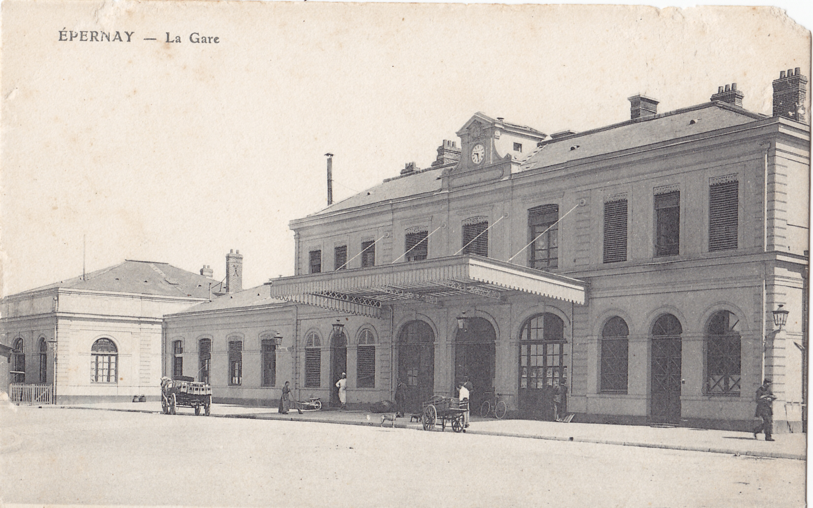 Carte postale ancienne sans mention d'éditeur : ÉPERNAY - La Gare